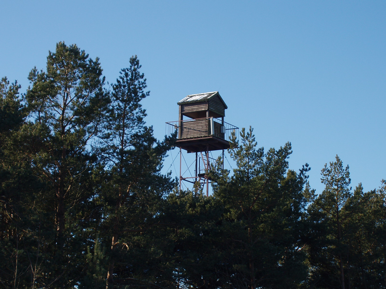 Vaatlustorn Vilsandil